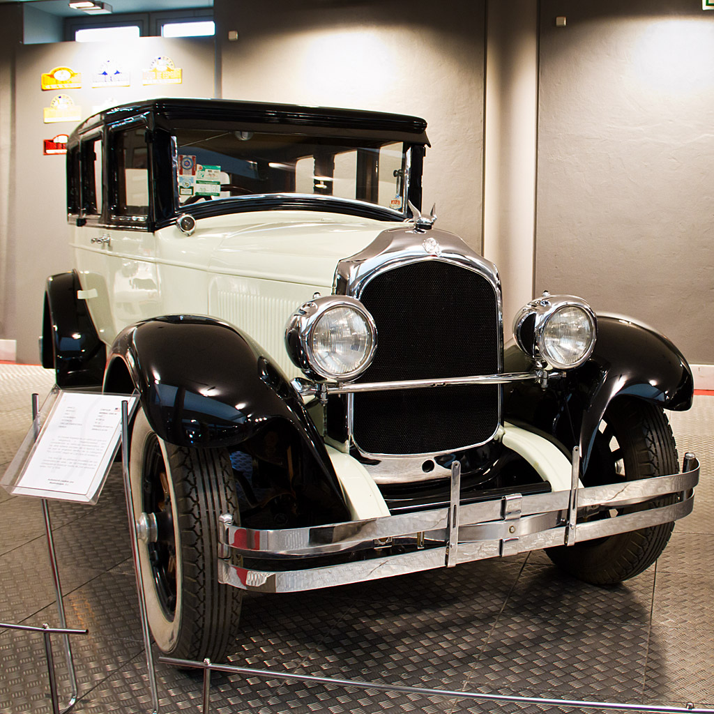 Museo de Historia de la Automoción de Salamanca CHRYSLER IMPERIAL SERIE 80 Wiki Loves Art Fotografía: Juan Miguel Ávila del Arco | Darco TT Canon EOS 7D | Objetivo EF-S18-135mm f/3.5-5.6 IS f/5.0 | 1/25 | ISO1000 Marca: CHRYSLER Modelo: IMPERIAL SERIE 80 Año: 1927 Cilindrada: 4.725 cc Potencia: 92 CV Carrocería: SEDÁN 4 PUERTAS Frenos: HIDRÁULICOS El Chrysler imperial es un vehículo que por su elegancia y majestuosidad era considerado el vehículo representativo de las altas esferas sociales de la época, tal es así que se engloba dentro de la categoría FULL CLASSIC según el Car Club of America. Fue uno de los primeros modelos de lujo construidos en serie, de tal manera que se consiguieron fabricar hasta 48.254 unidades entre 1927 y 1928 Museo de Historia de la Automoción de Salamanca Automóvil cedido por Marinduque, S.L.